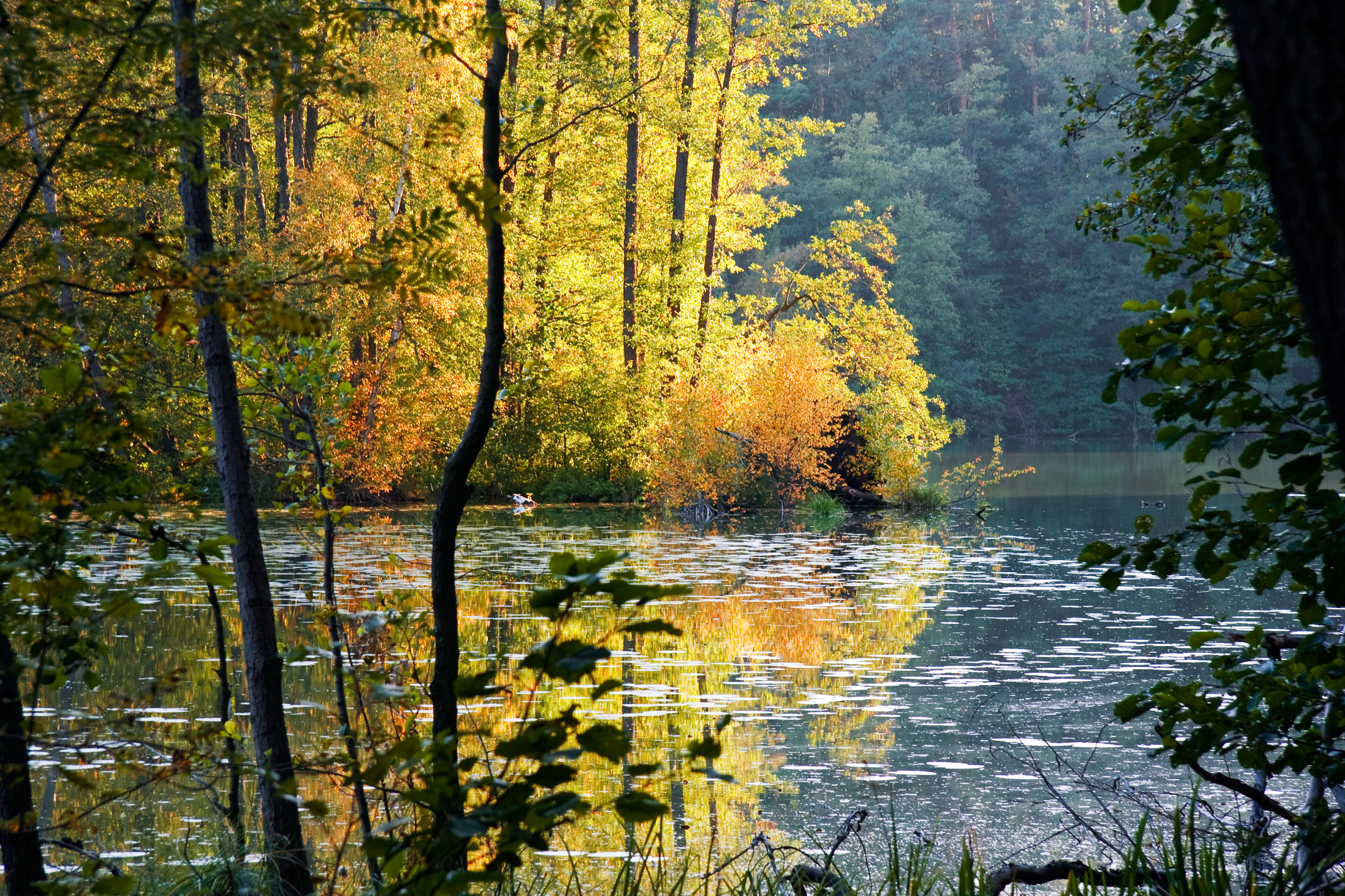 Naturschutzgebiet „Schlaubetal“, Siehdichum, Kleiner Schinkensee